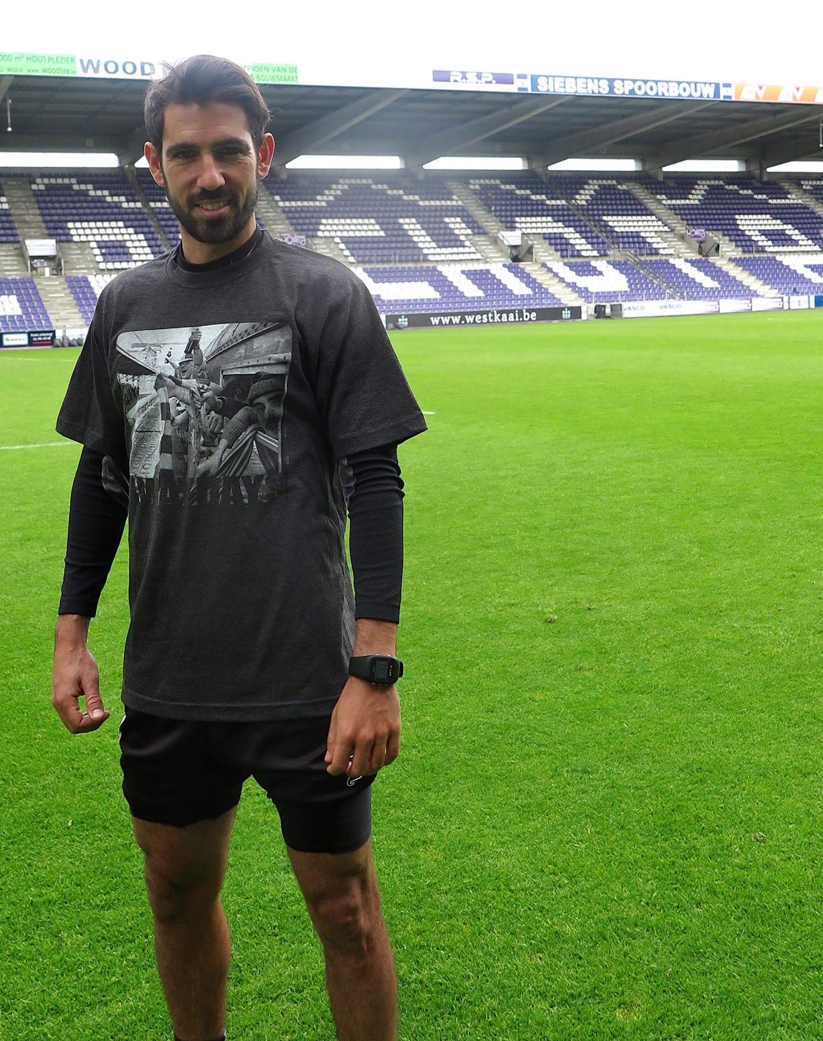 Hernan losada